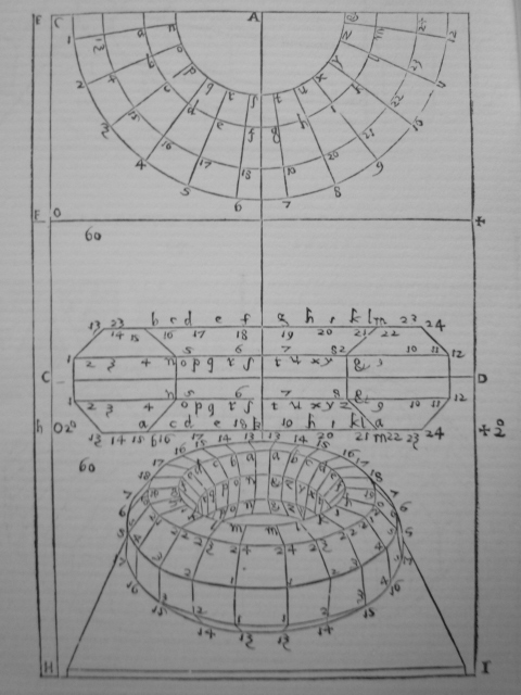 Barbaro, Perspetivi (1569), mazzocchio perspektivigita